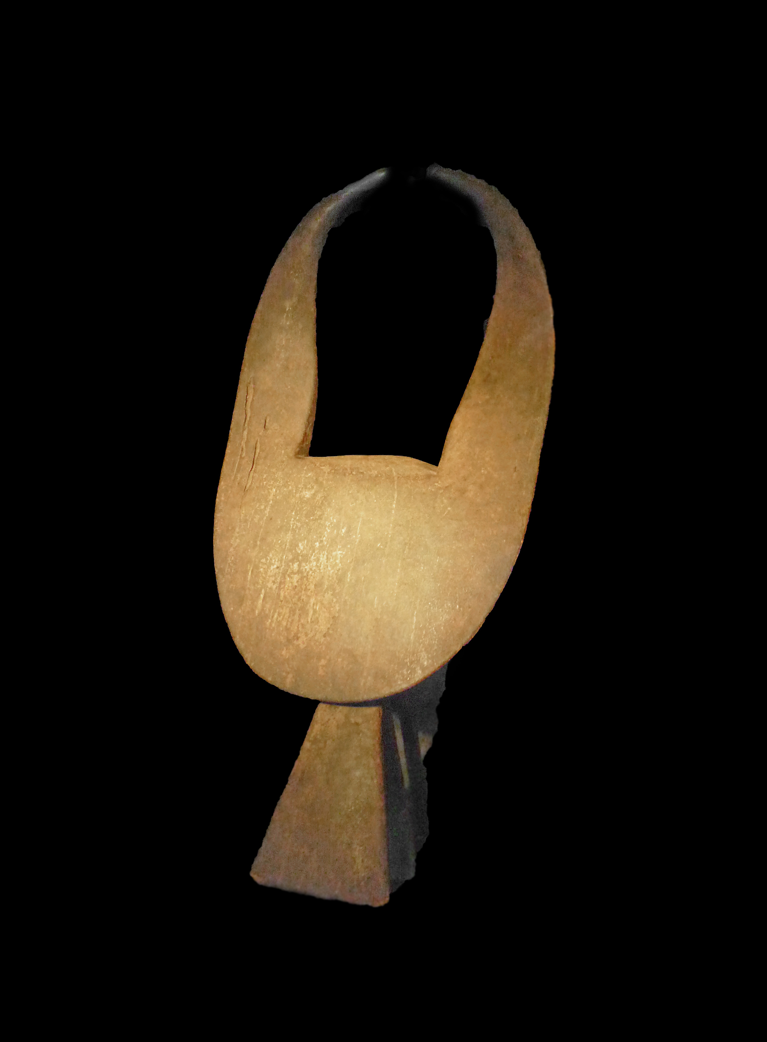 Masque-buffle nain ("petit" Mangam). Kantana ou Kulere. Première moitié du XXe s. Bois. Exposition Nigeria. Arts de la vallée de la Bénoué au musée du quai Branly (Paris)